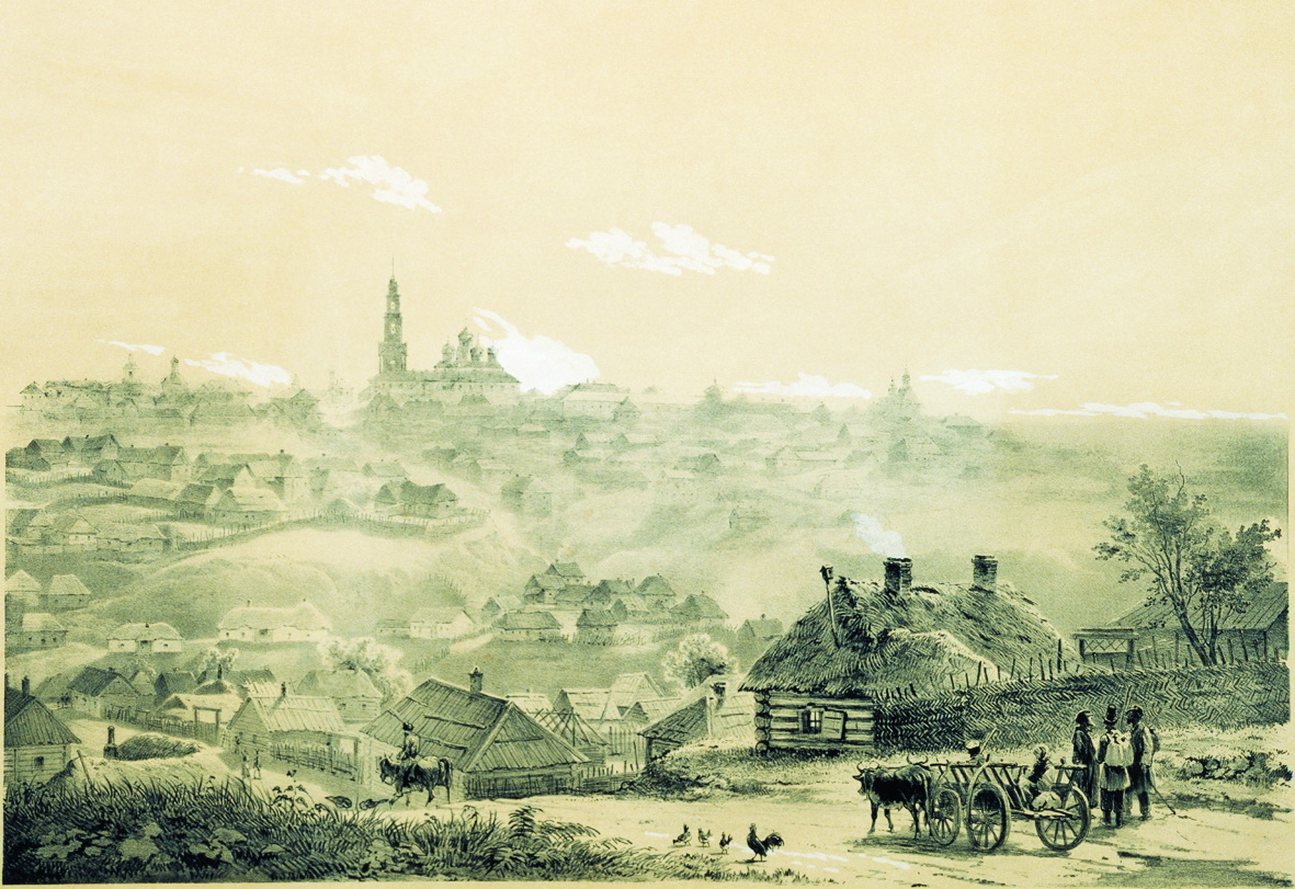 Тимм Василий Федорович. Вид Воронежа с западной стороны. XIX век.